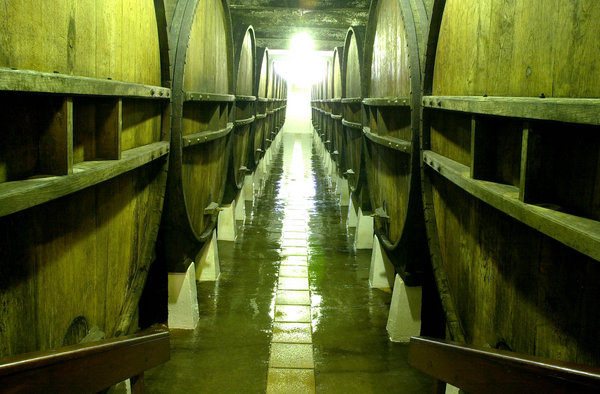 Sagardo kupelak.